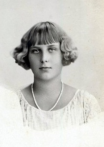 María Cristina de Borbón y Battenberg en fotografía